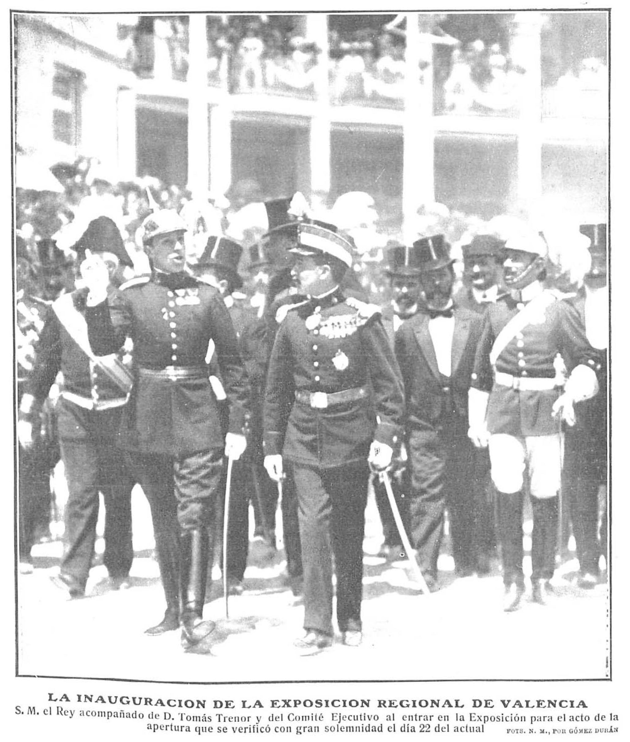 La inauguración de la Exposición Regional de Valencia (1909).